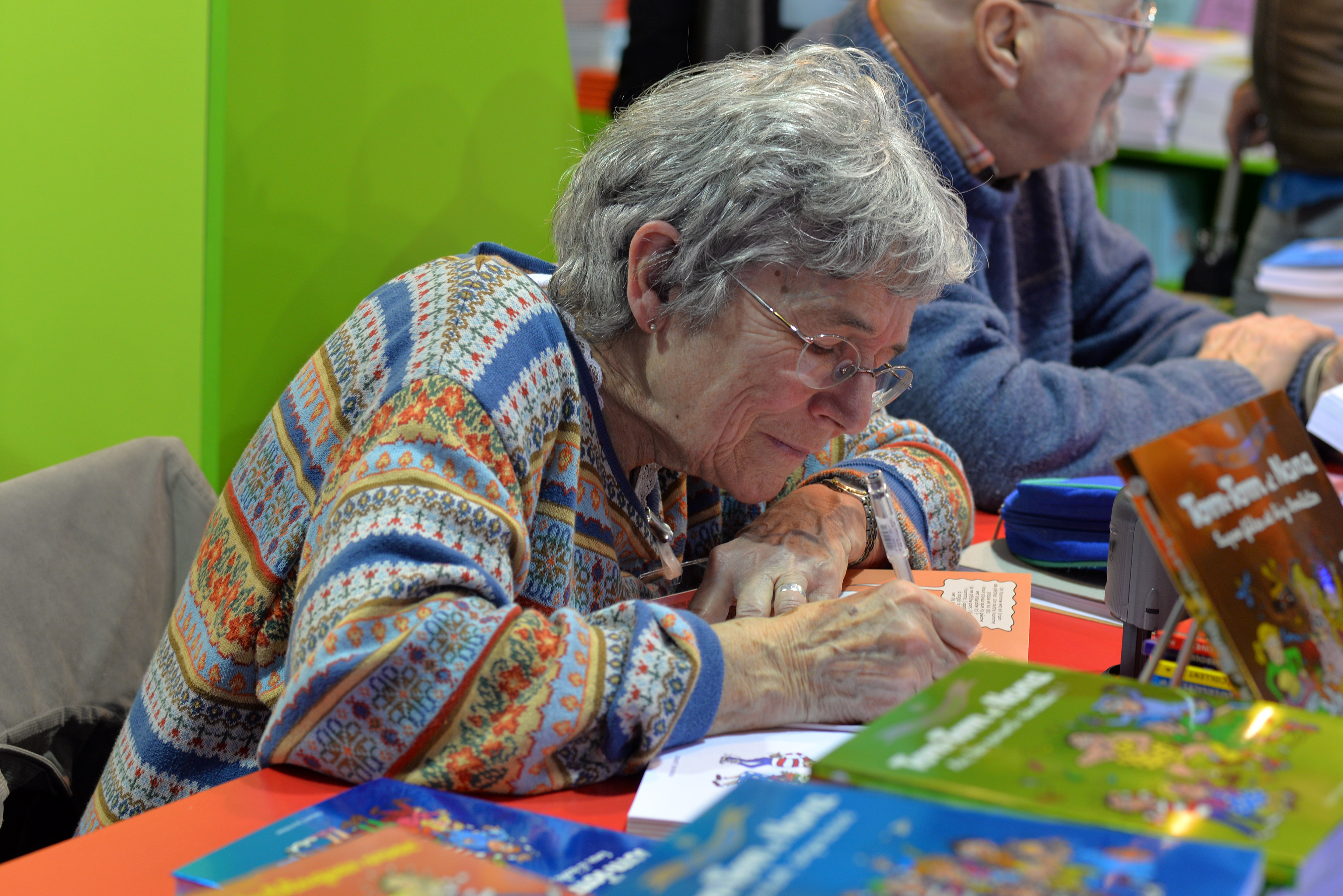 La dessinatrice française Bernadette Després en séance de dédicaces au stand BDKids du Festival International de la BD d'Angoulême, 30 janvier 2015.